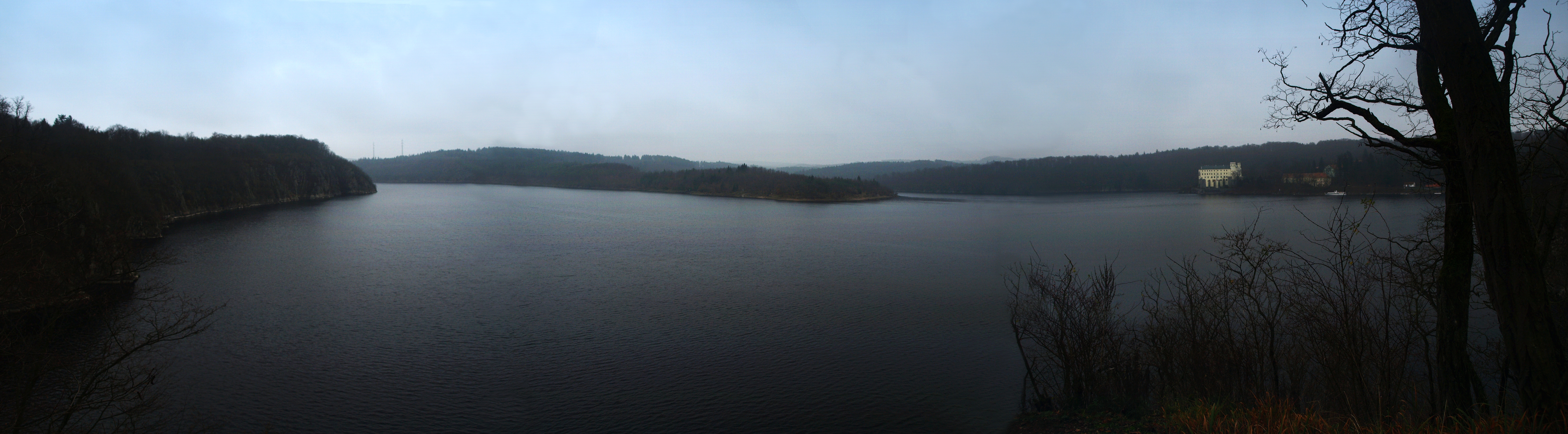 Orlická přehrada